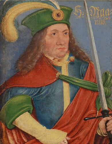 Herzog Magnus von Sachsen